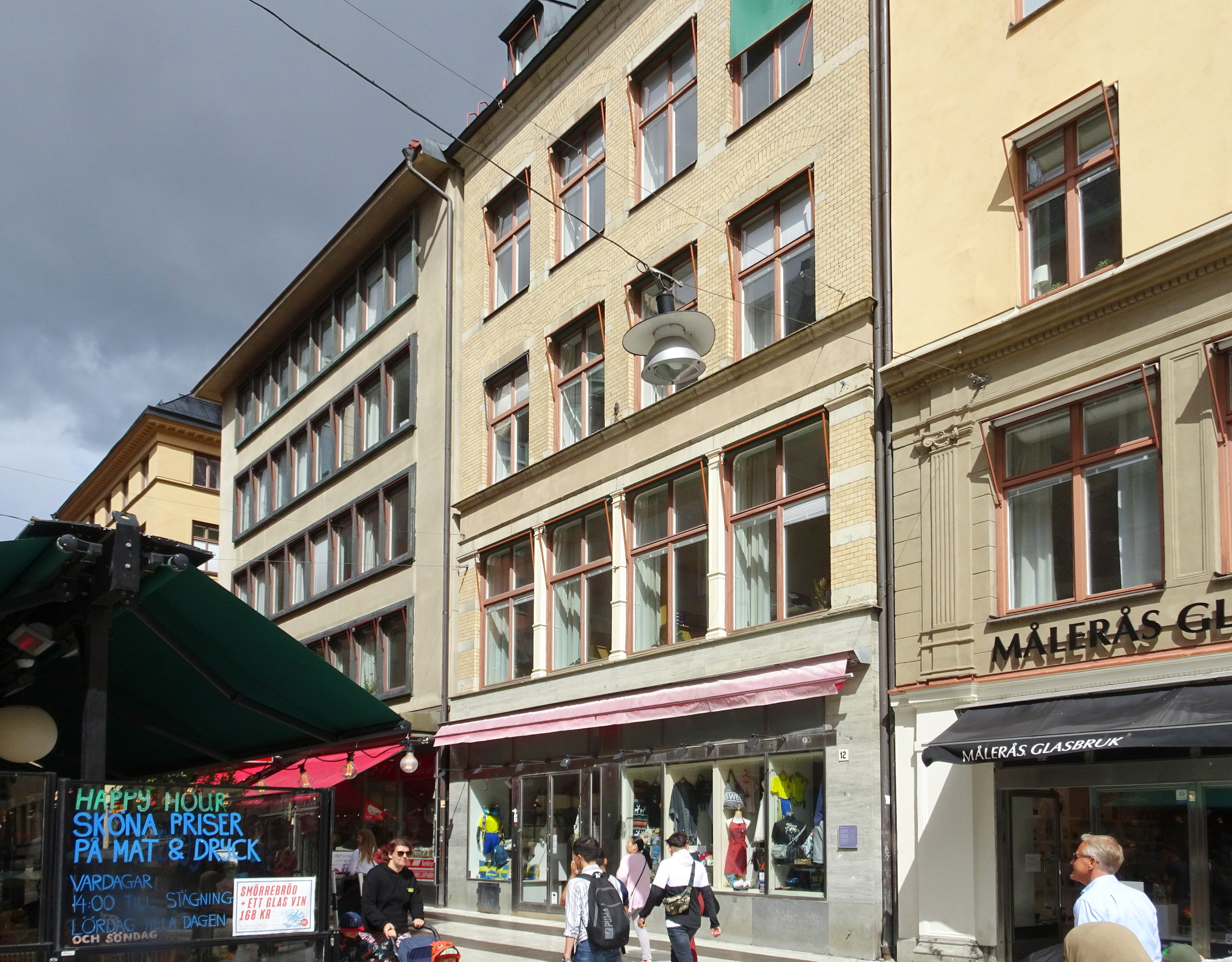 Drottninggatan 12, Kumlienska huset (kvarteret Brunkhuvudet), byggår 1892, Hjalmar Kumlien (Arkitekt), Lars Östlihn (Byggmästare).